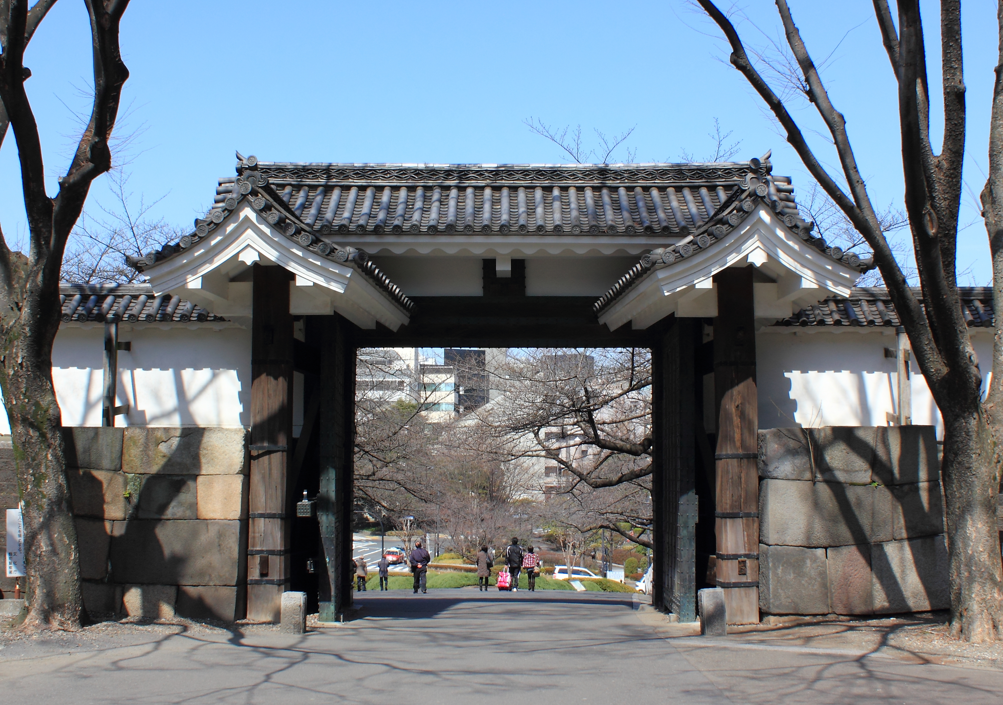 田安門（重要文化財）、東京都千代田区。